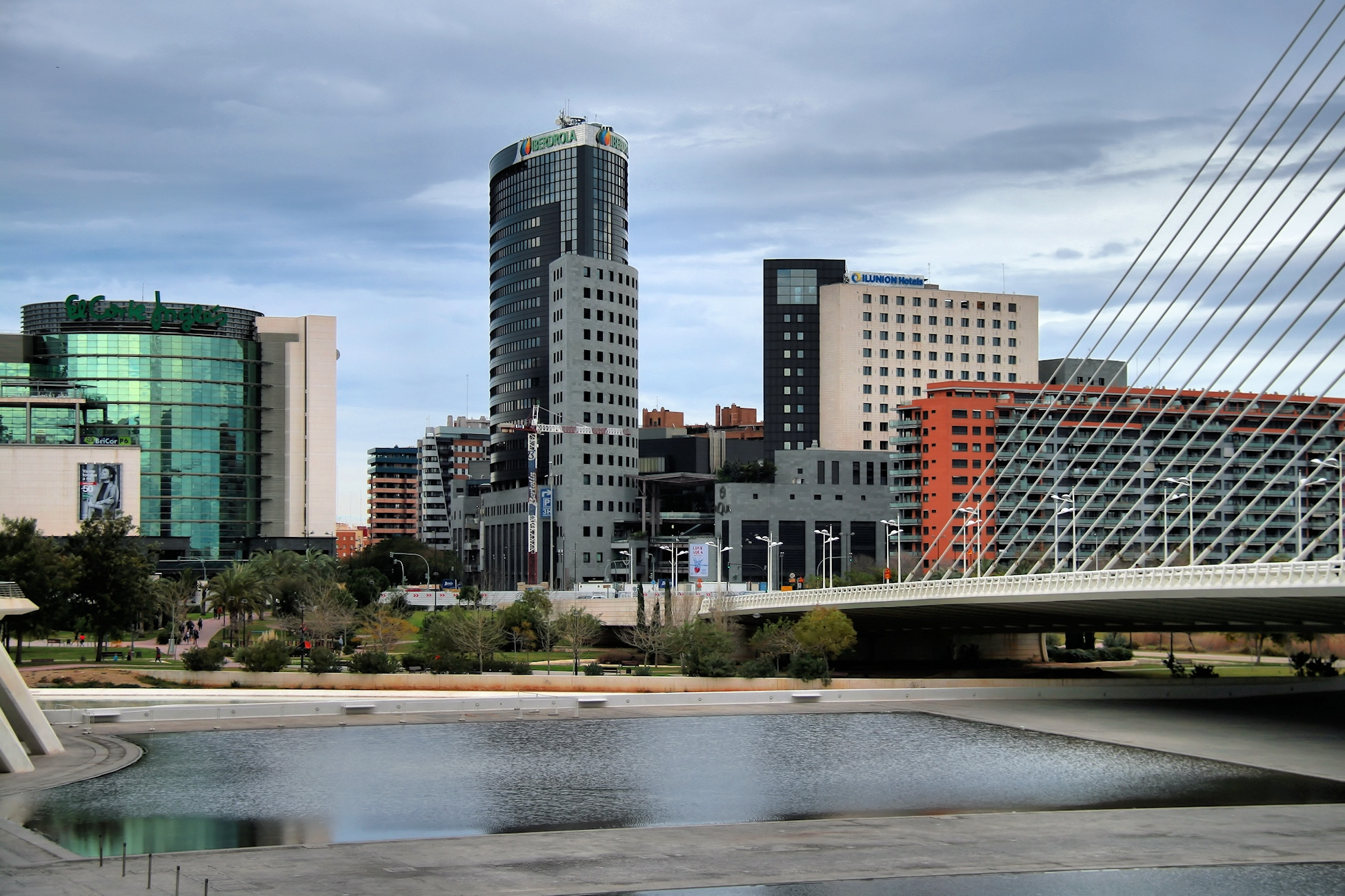 Valencia